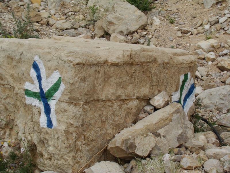 Křížení dvou turistických cest v Izraeli